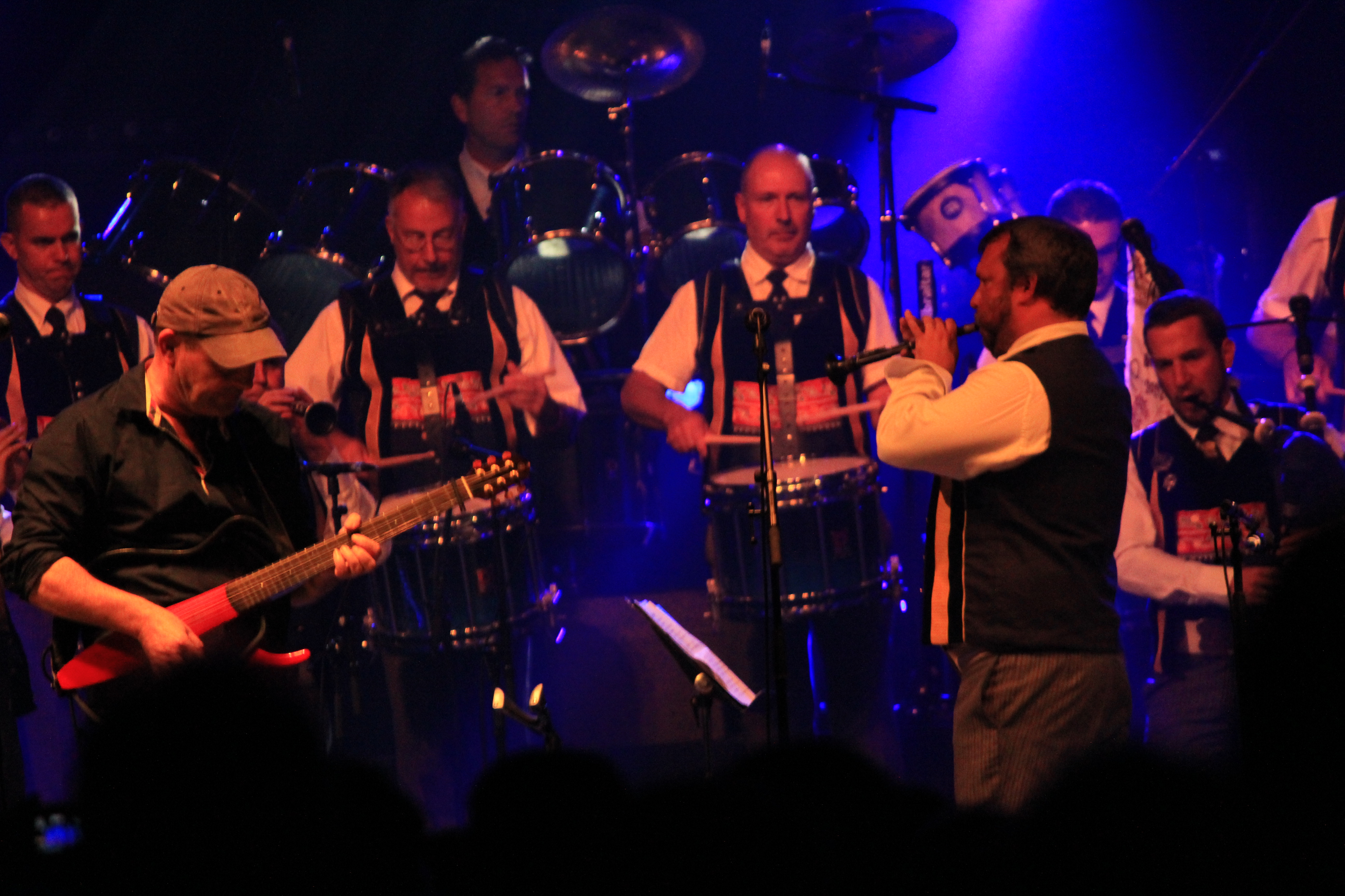 Concert de Red Cardell et du Bagad Kemper lors du festival interceltique de Lorient.